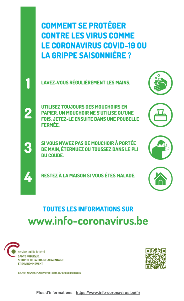 Conseils officiels - Pandémie de Covid-19 en Belgique